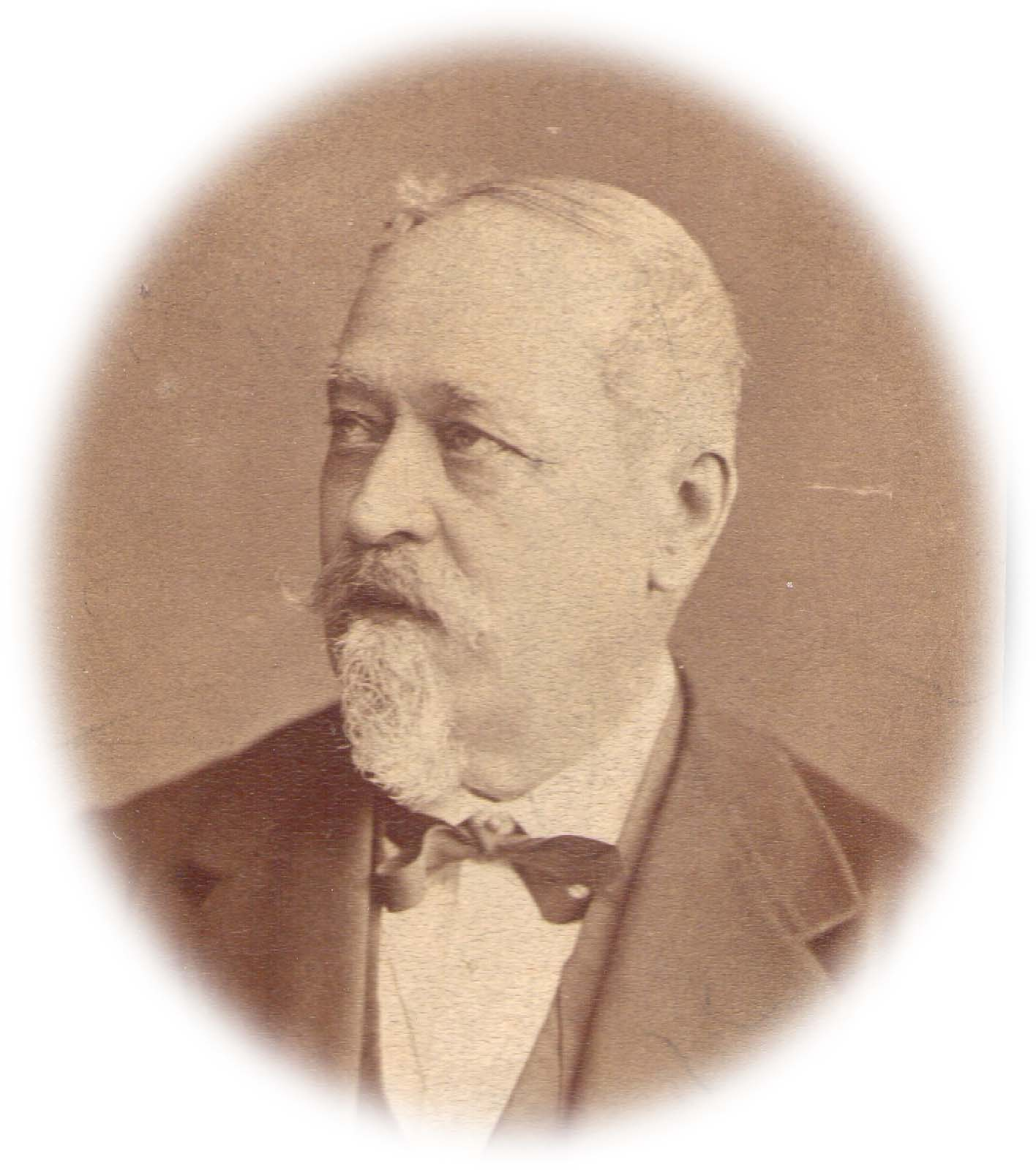 Herrich Károly vízépítő mérnök, miniszteri tanácsos, a Tisza-szabályozás felügyelője.